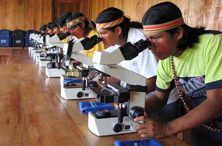 Indios lernen auch, Malaria-Plasmodien zu erkennen.